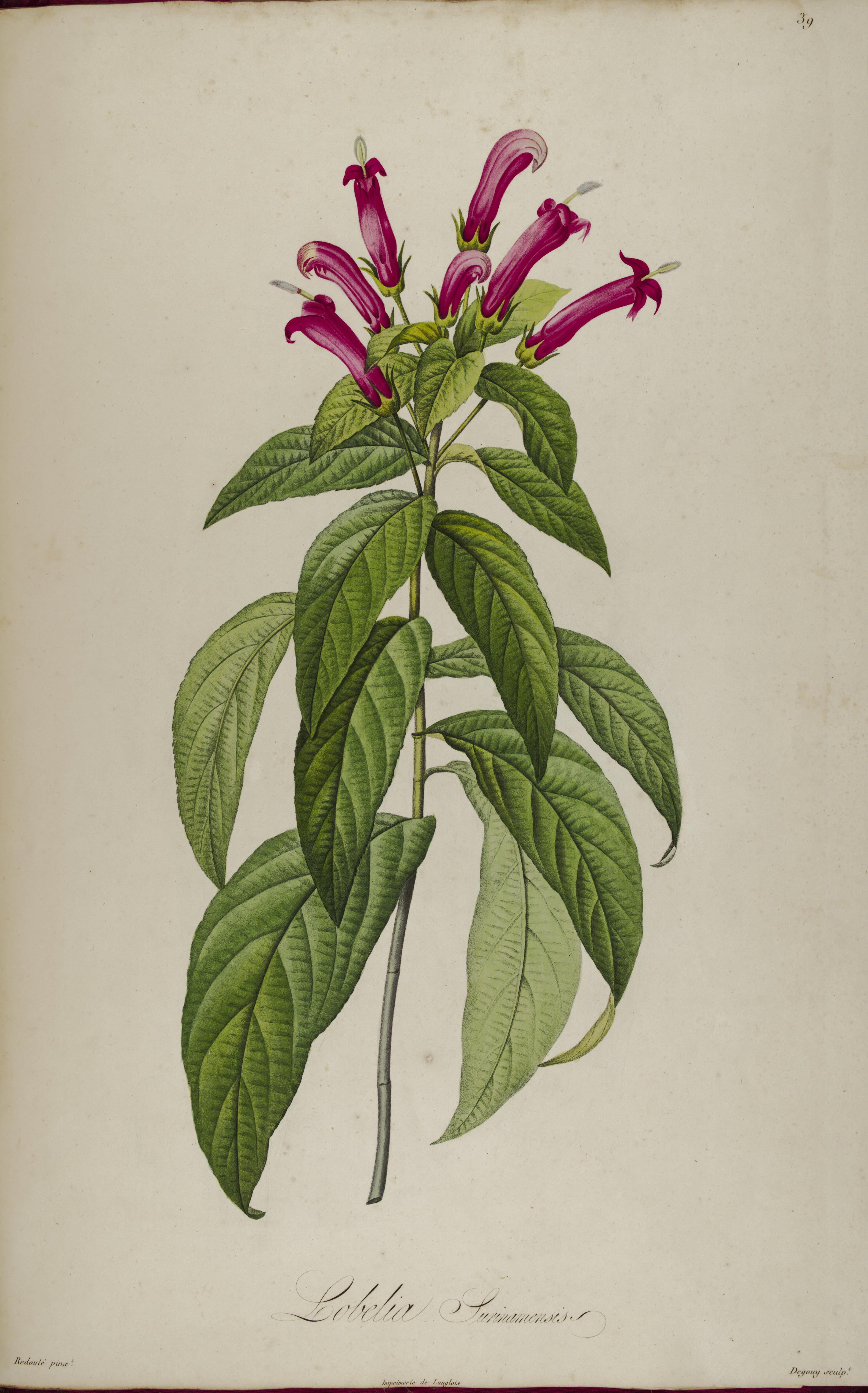 Description des plantes rares cultivees a Malmaison et a Navarre /par Aime Bonpland.